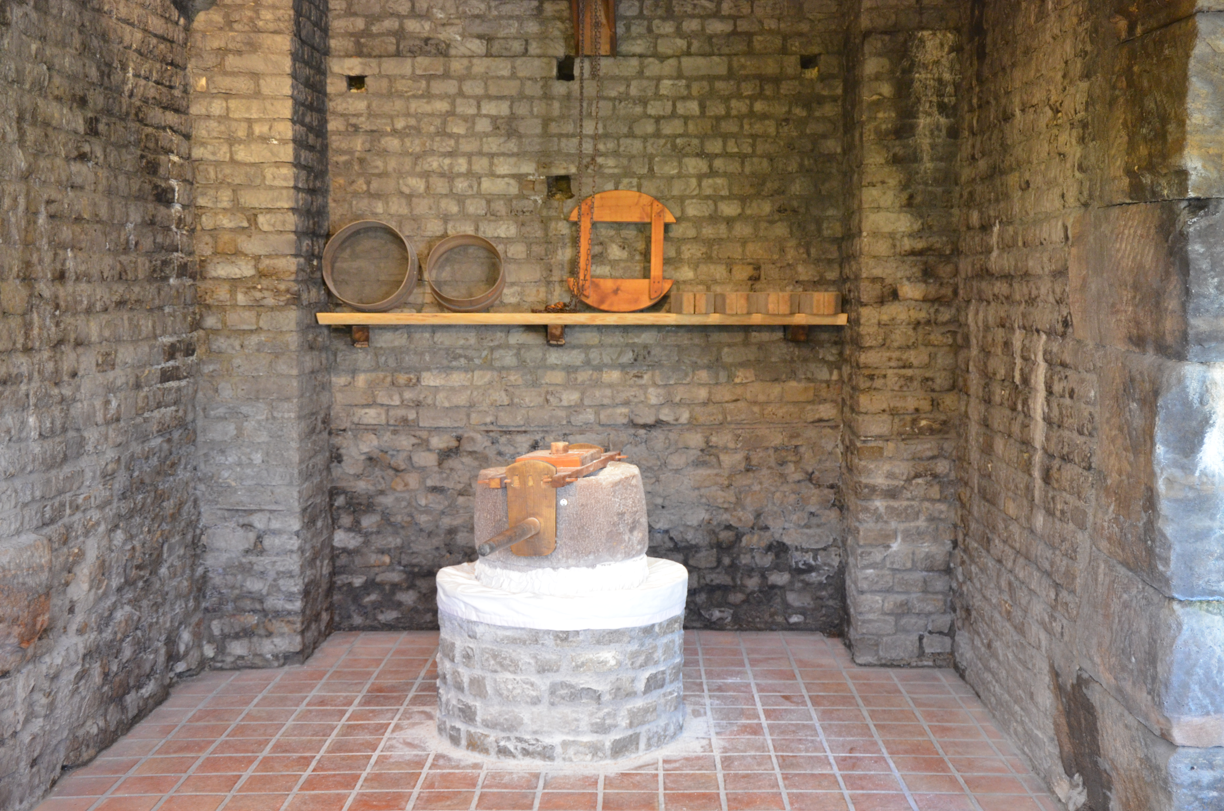 Augusta Raurica, Switzerland